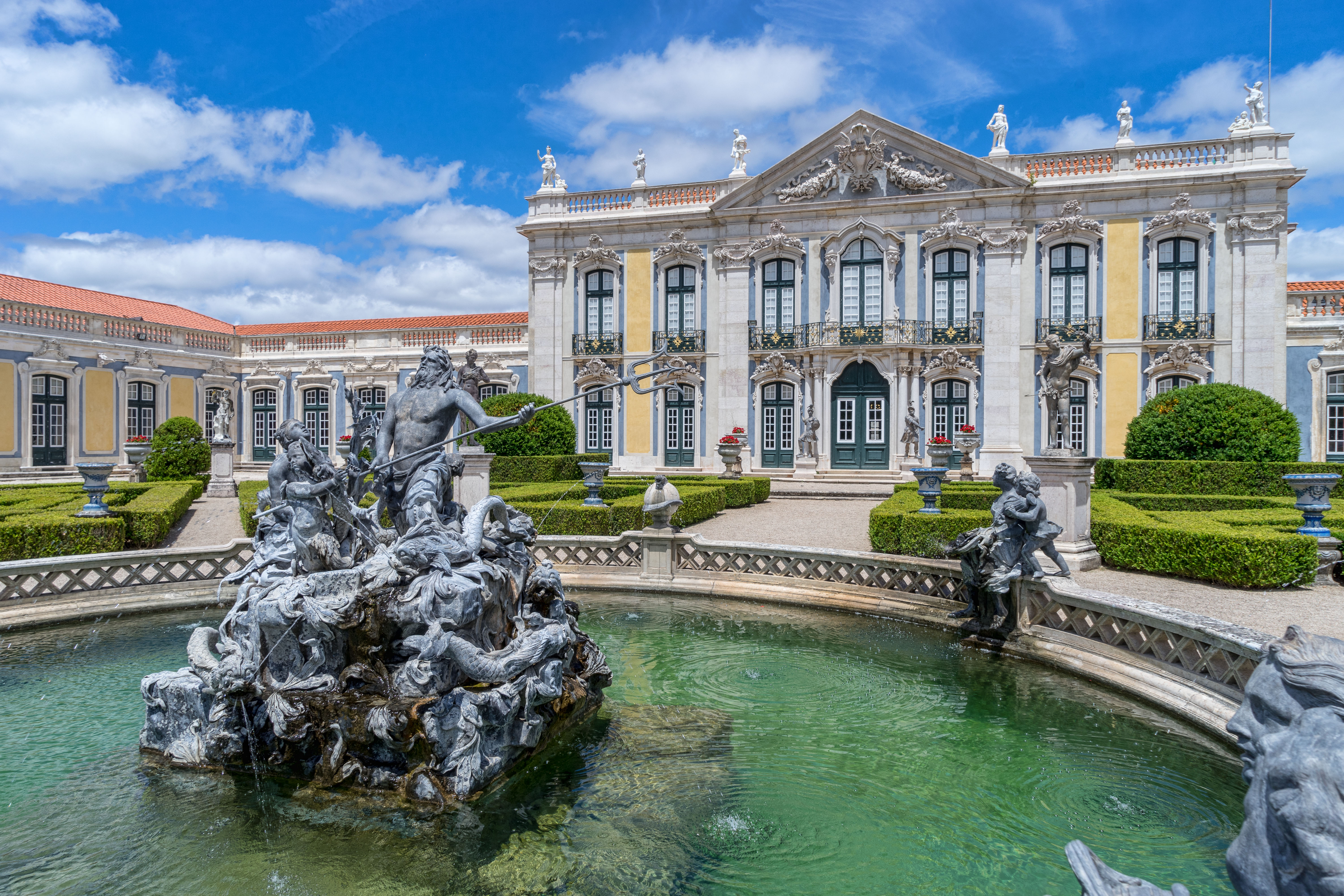 Palais_royal_de_Queluz - Fontaine